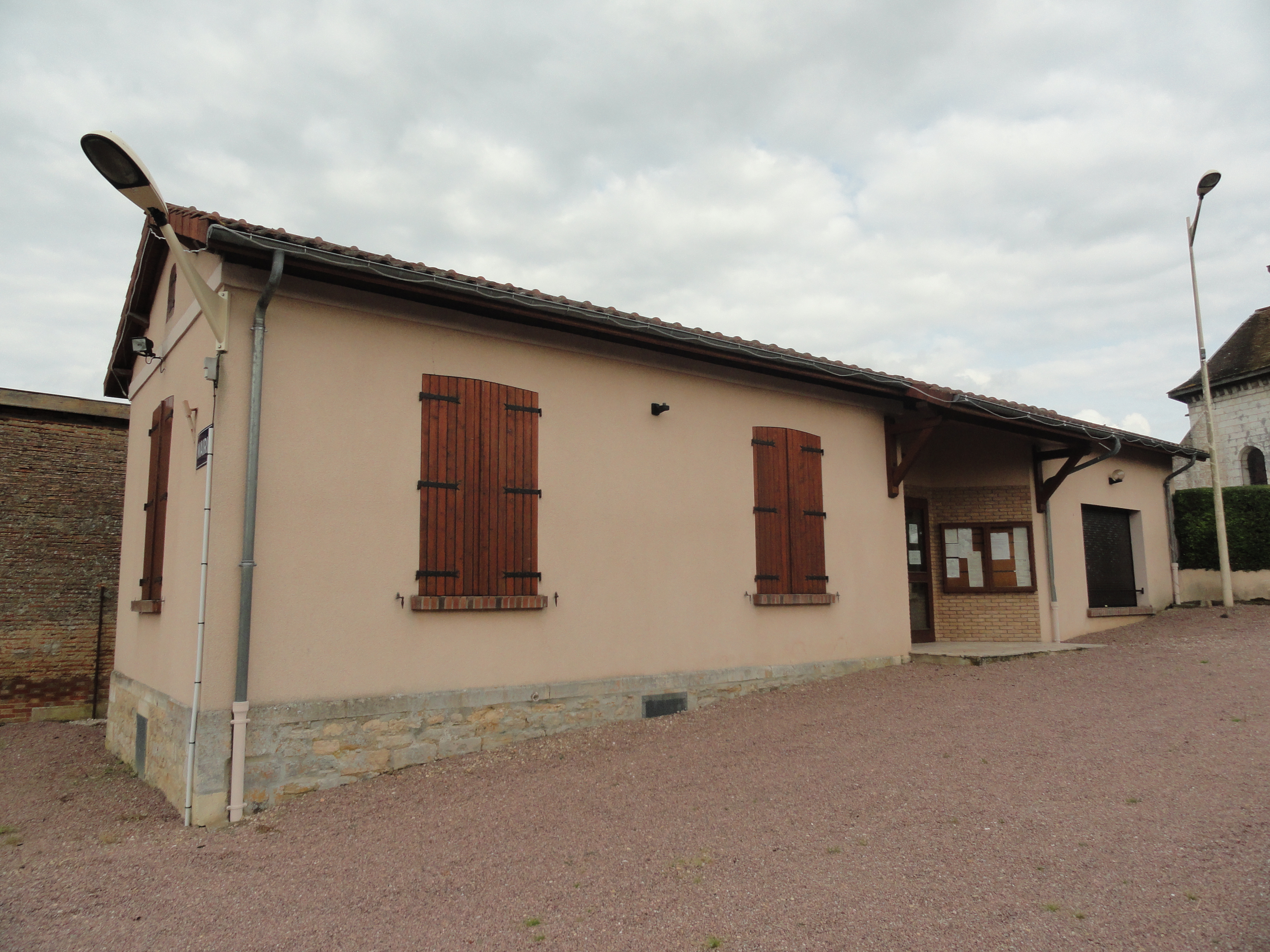 La mairie de Drouilly (51).